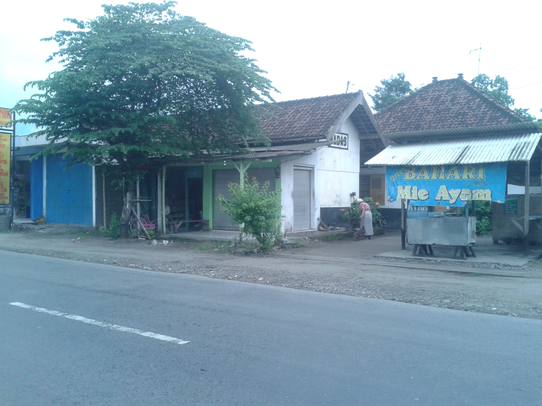 STASIUN BADAS